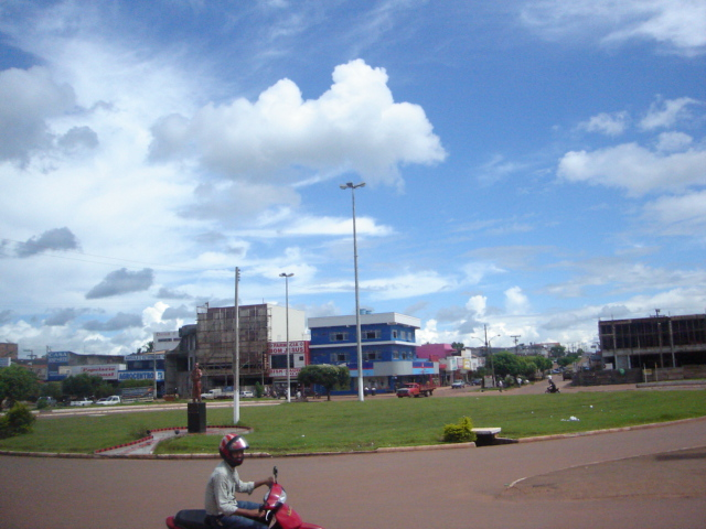 Picture of Rolim de Moura, Rondônia, Brazil.